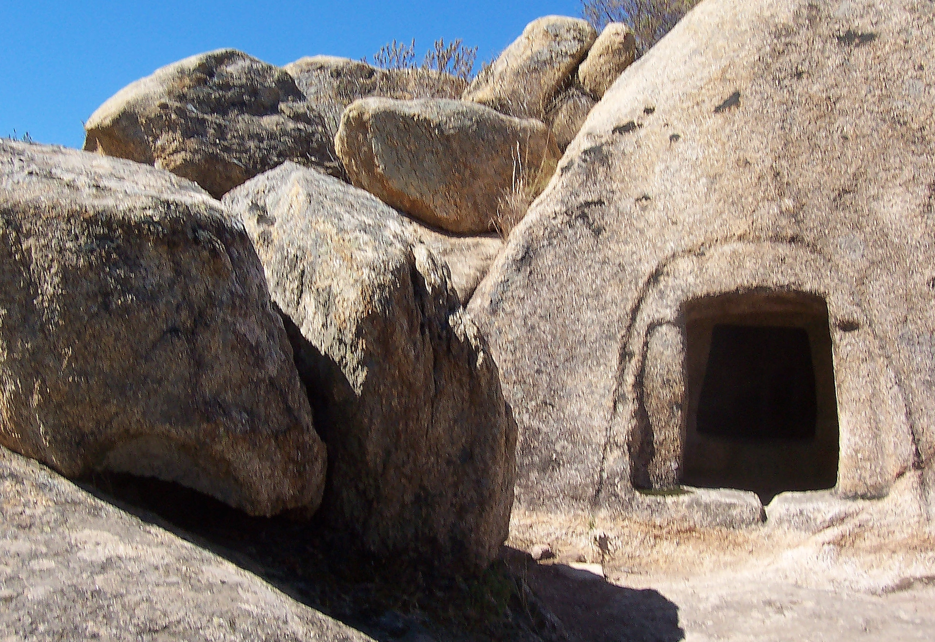 Una domus de Janas nella necropoli nuragica di Lotzorai (Og)